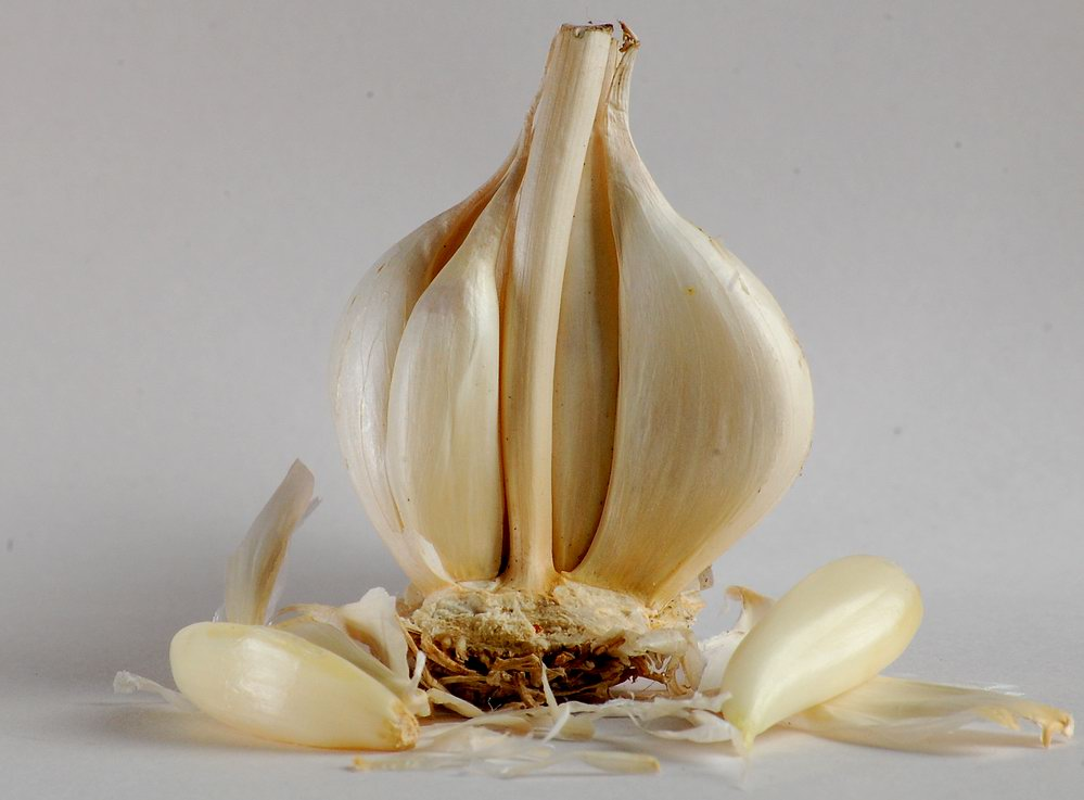 Garlic